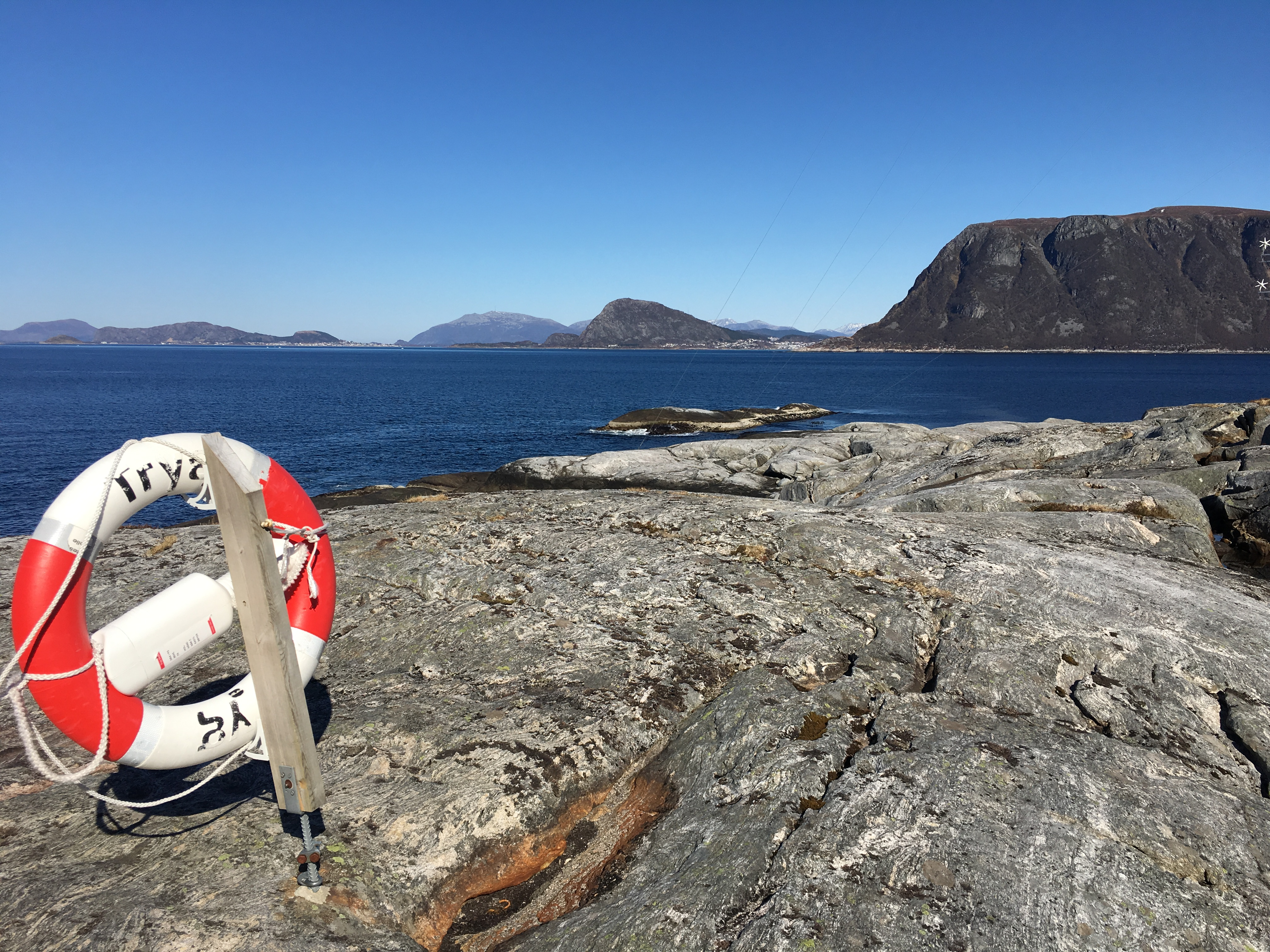 Berget på kvitneset der ammunisjons bunkere og skytestillinger befinner seg